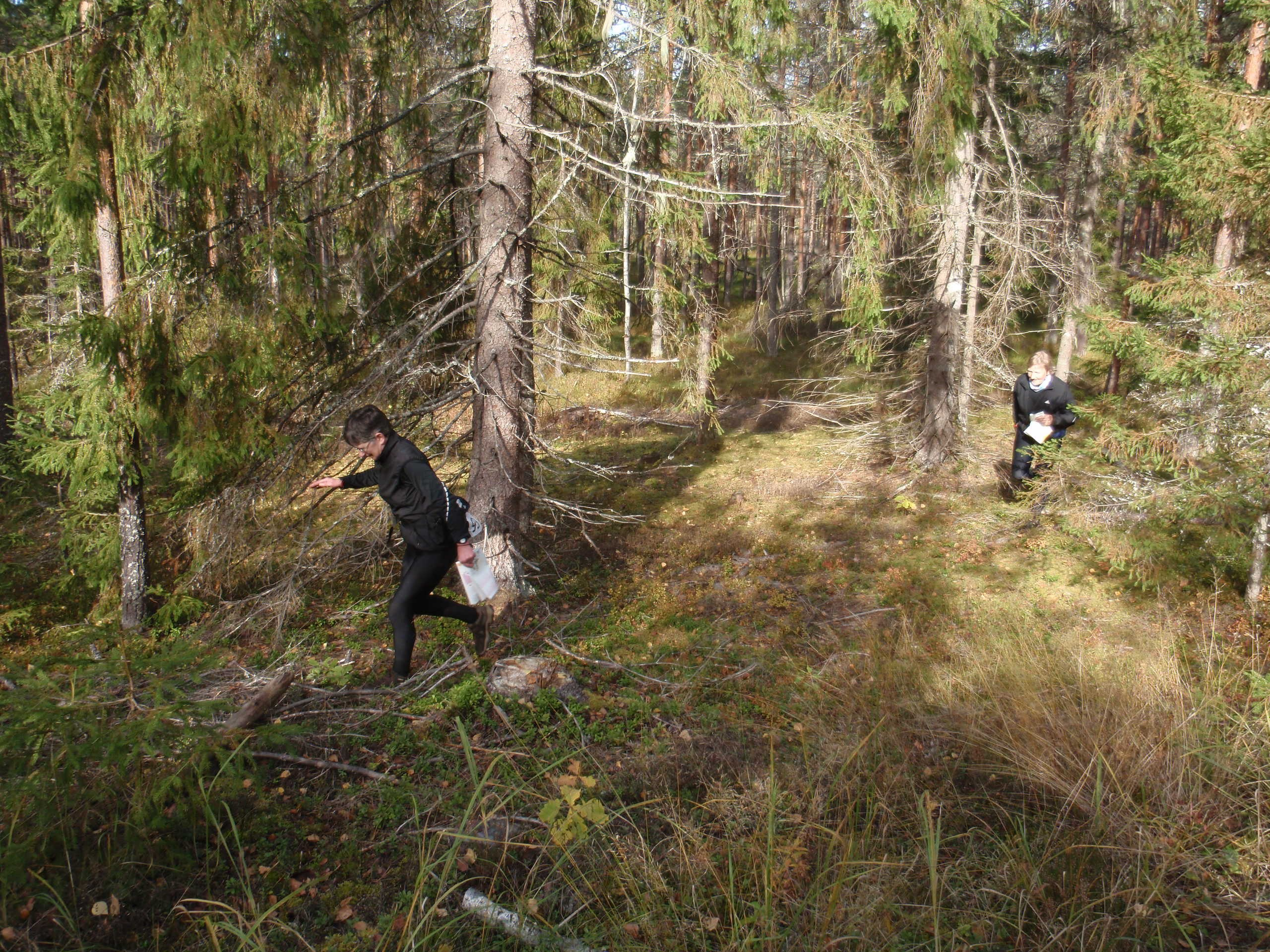 Orienteerujad maastikul